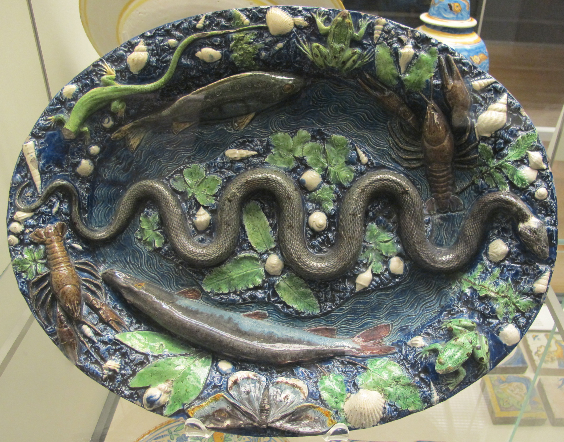 Bottega di bernard palissy, vassoio rustico, 1575-1600 ca.